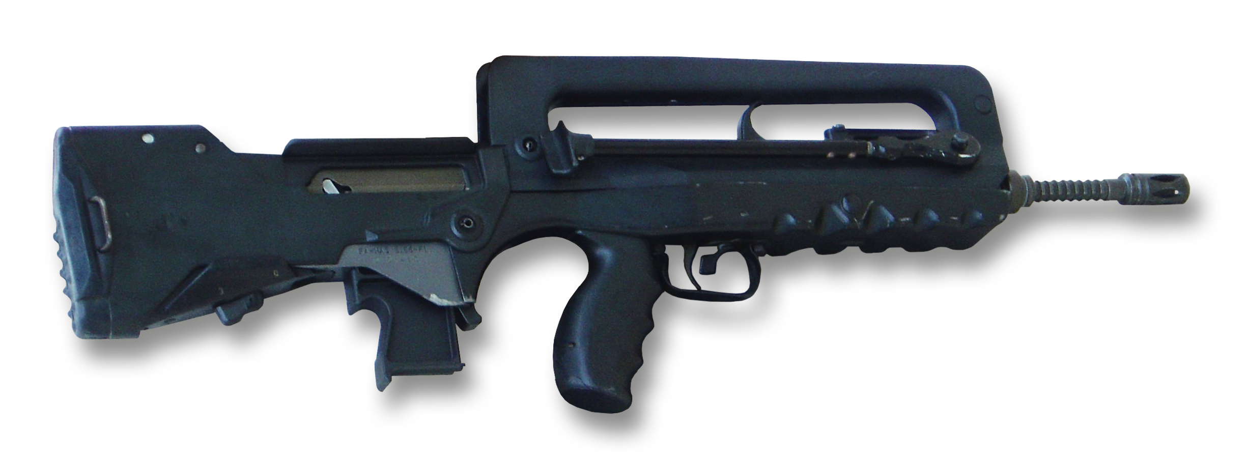 FAMAS Sturmgewehr (Frankreich)